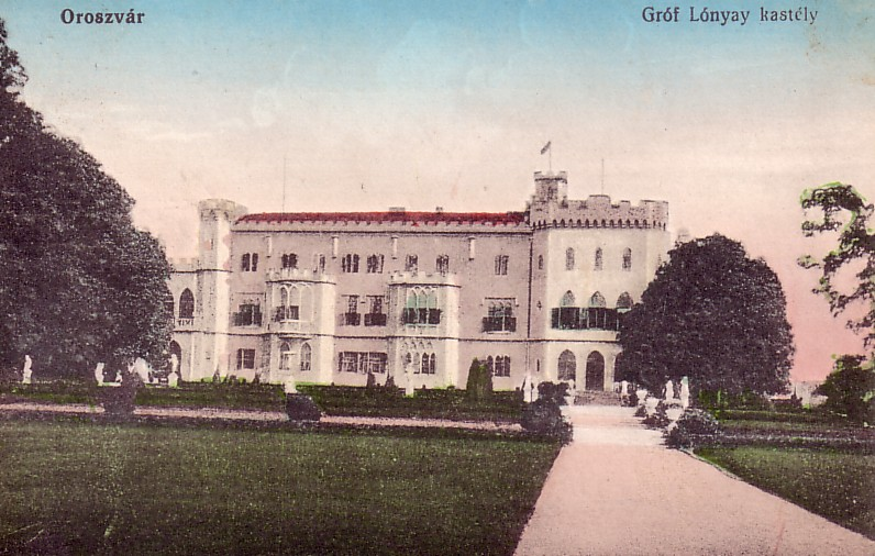 Lónyay-Schlösschen (alte Ansichtskarte)